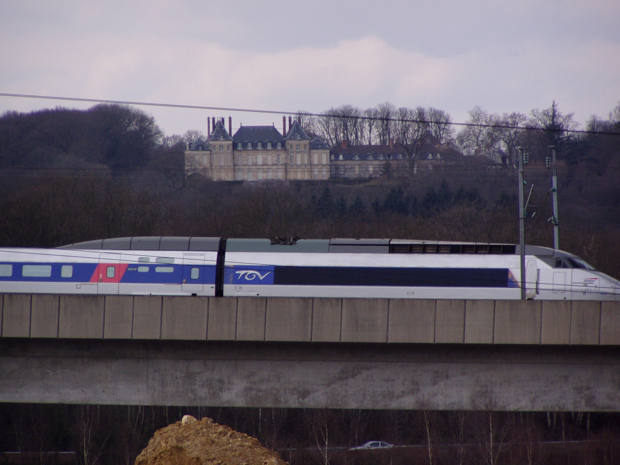 Le TGV Atlantique avant son entrée dans le tunnel de Villejust ; au loin, le château de Saint-Jean-de-Beauregard.